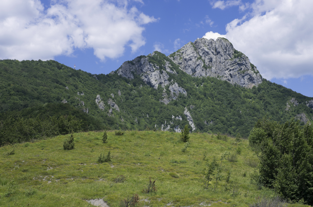 Pogled na vršnu stijenu Kleka